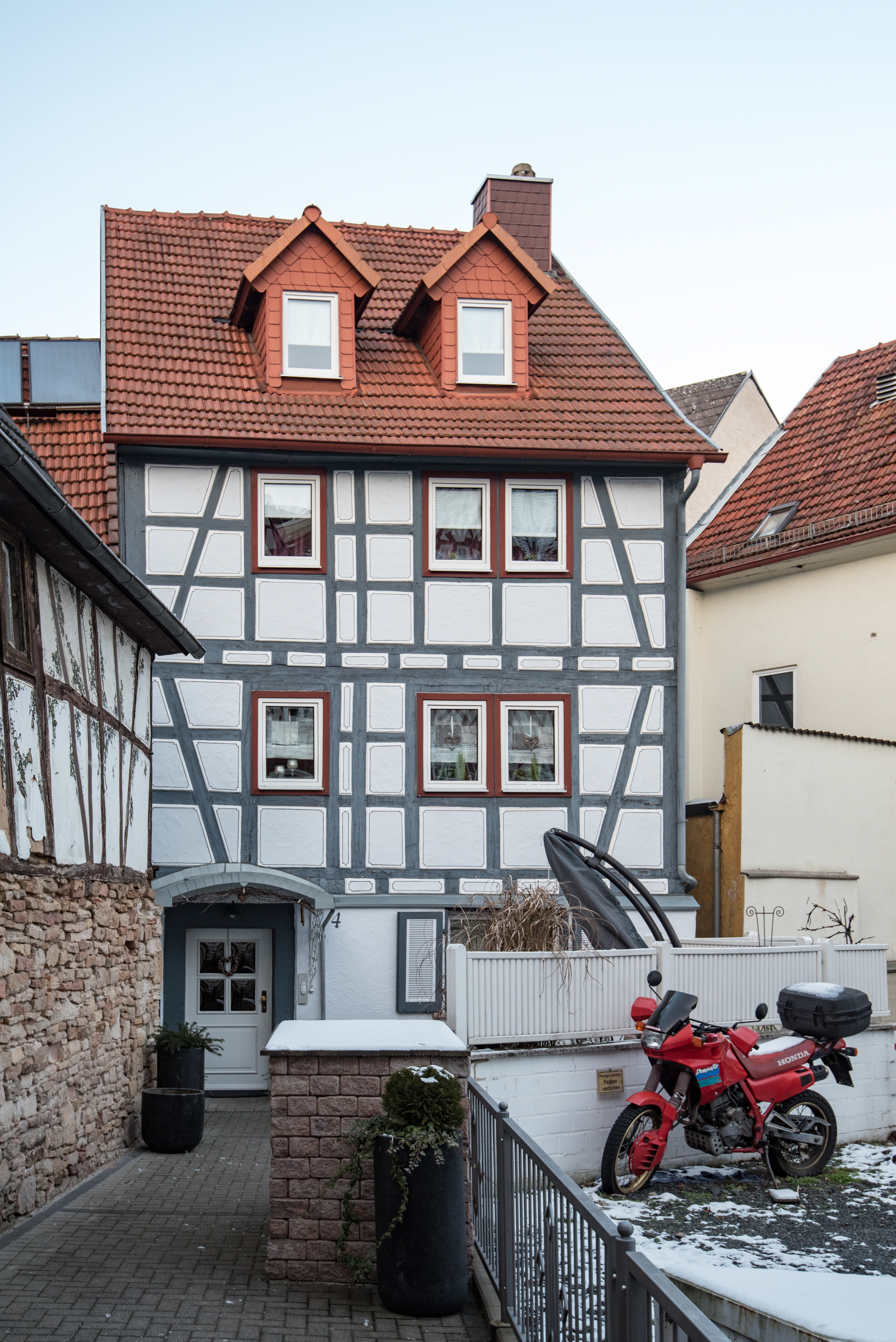 Bad Orb, Kirchgasse 4